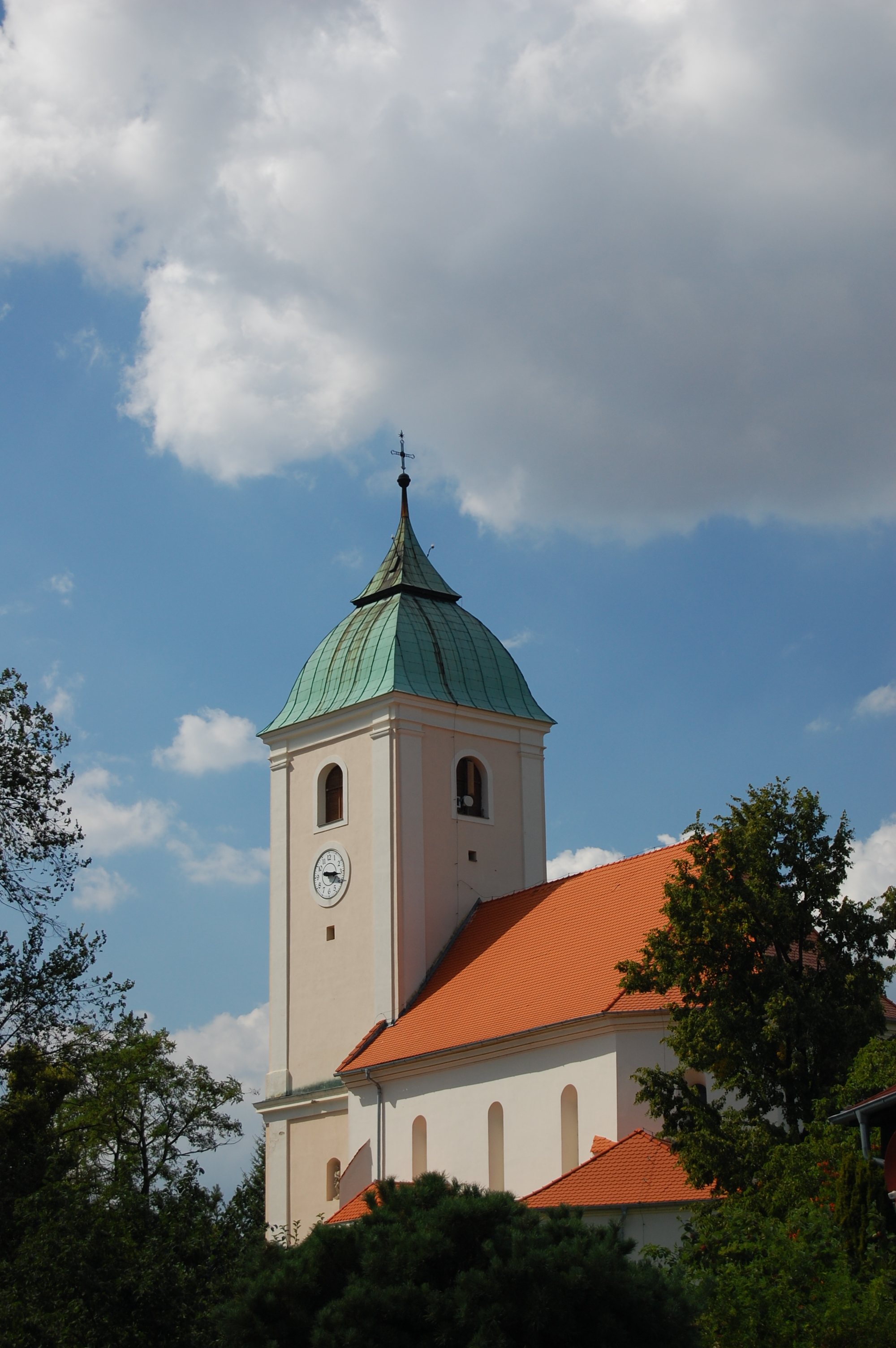 Kostel Nejsvětější Trojice - pohled zezadu, Plumlov, okres Prostějov